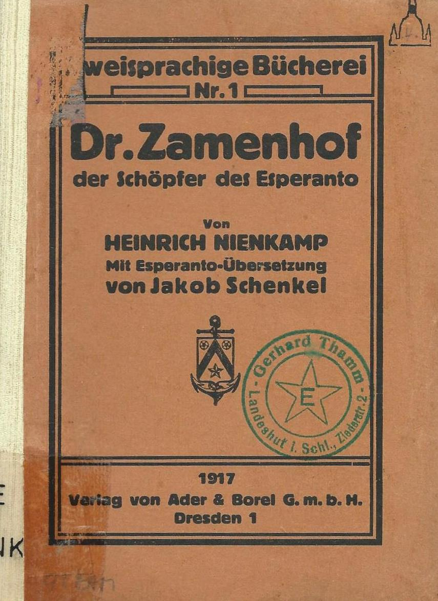 kovrilo de libro "Dr Zamenhof", 1917